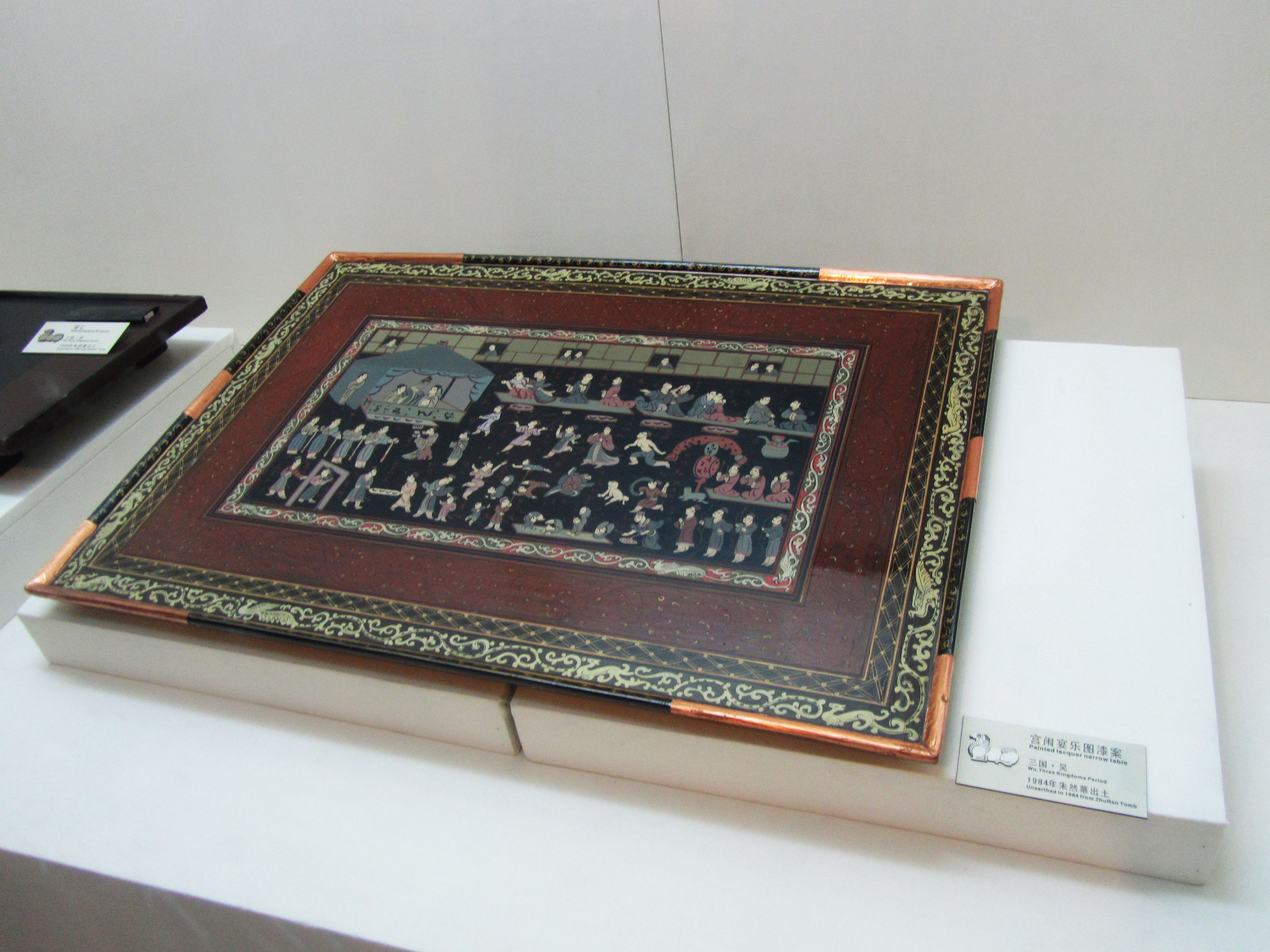 朱然墓出土的漆案。